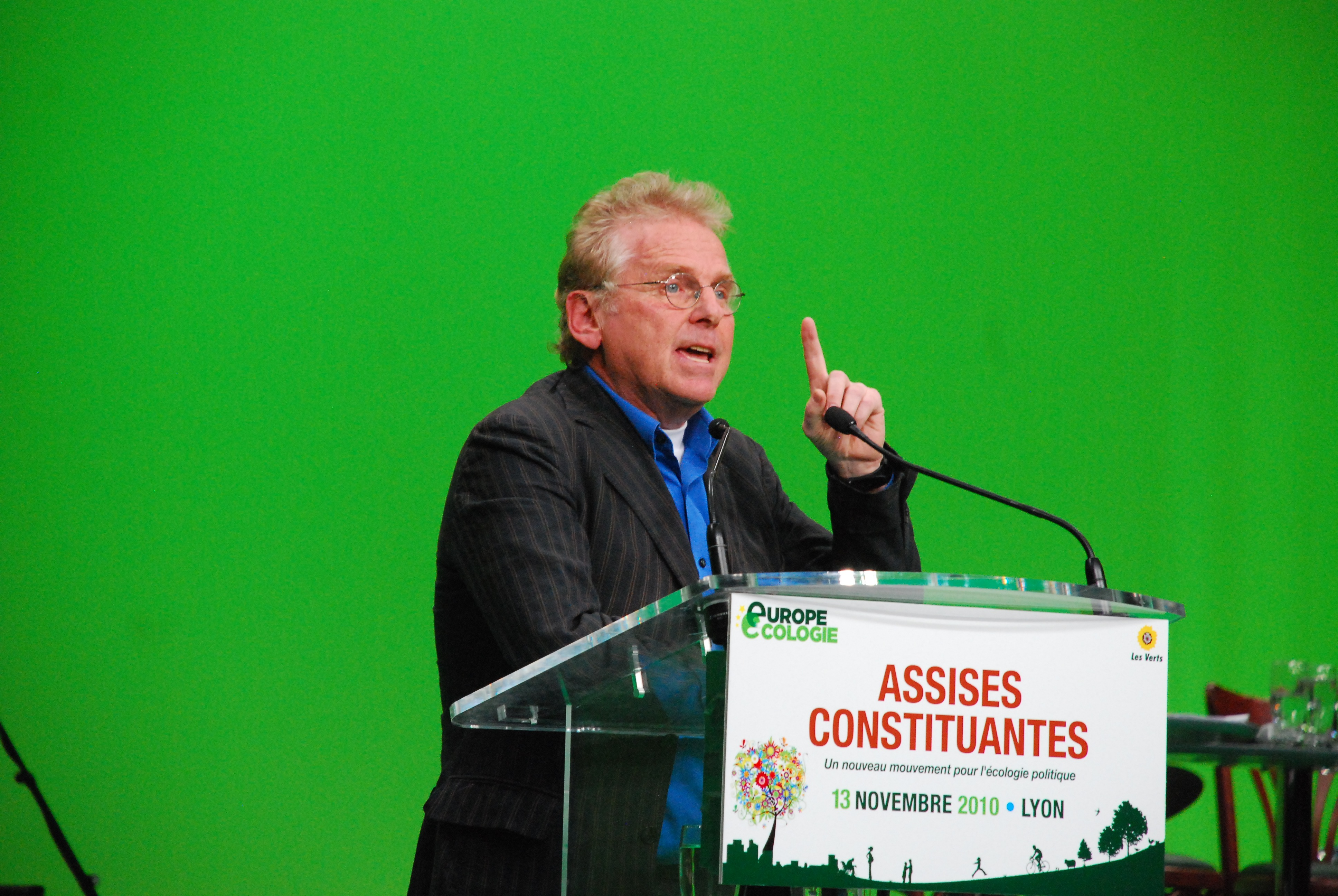 Daniel Cohn-Bendit lors des Assises Constituantes d'Europe Ecologie à Lyon